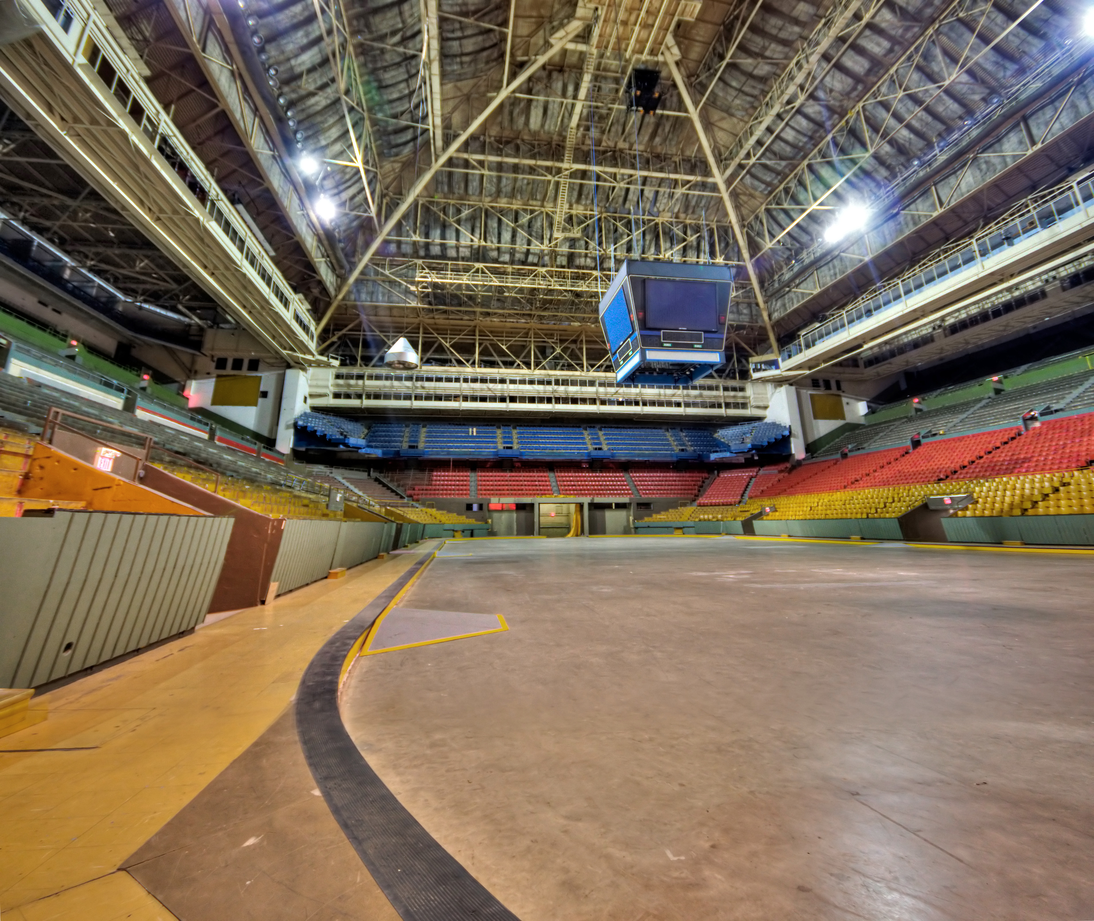 Maple Leaf Gardens [4]